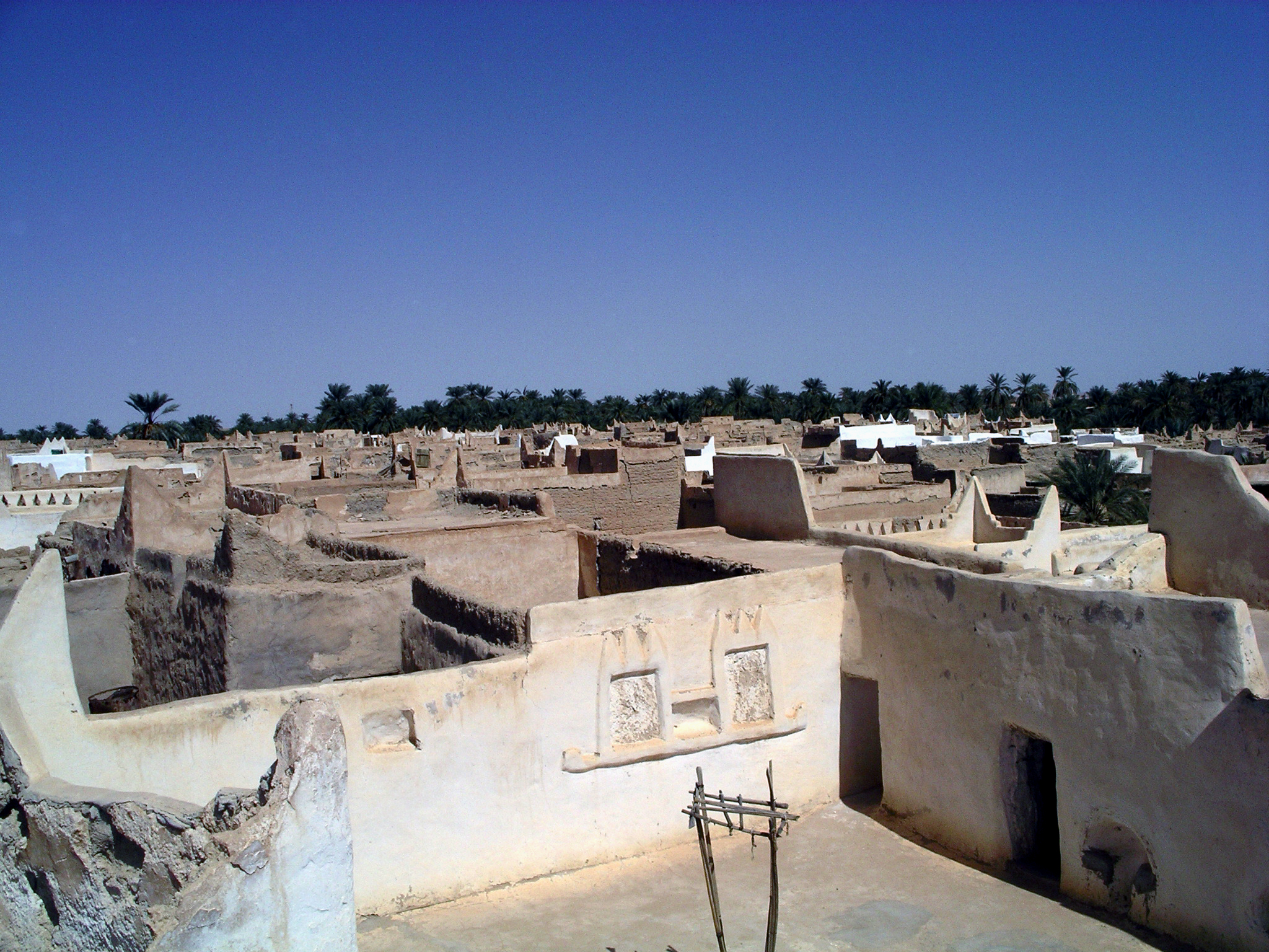 Blick über den Dächern der Oasenstadt Ghadames. Früherer wichtigster Knotenpunkt der Kamelkarawanen in alle Himmelsrichtungen der Sahara. Die Altstadt umgibt eine 7 km lange Mauer und in der Altstadt standen früher über 30.000 Dattelpalmen. Heute ist die Altstadt als Wohngebiet von der UNESCO gesperrt. Die Bewohner wurden alle in eine neu errichtete Stadt umgesiedelt.